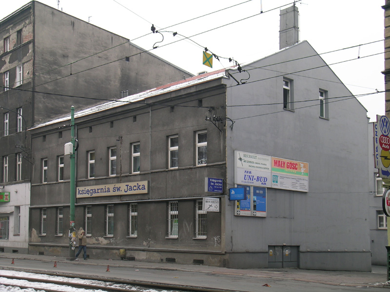 Siedziba Księgarni św. Jacka w Katowicach. Data: 2005-11-24 Autor: stAn